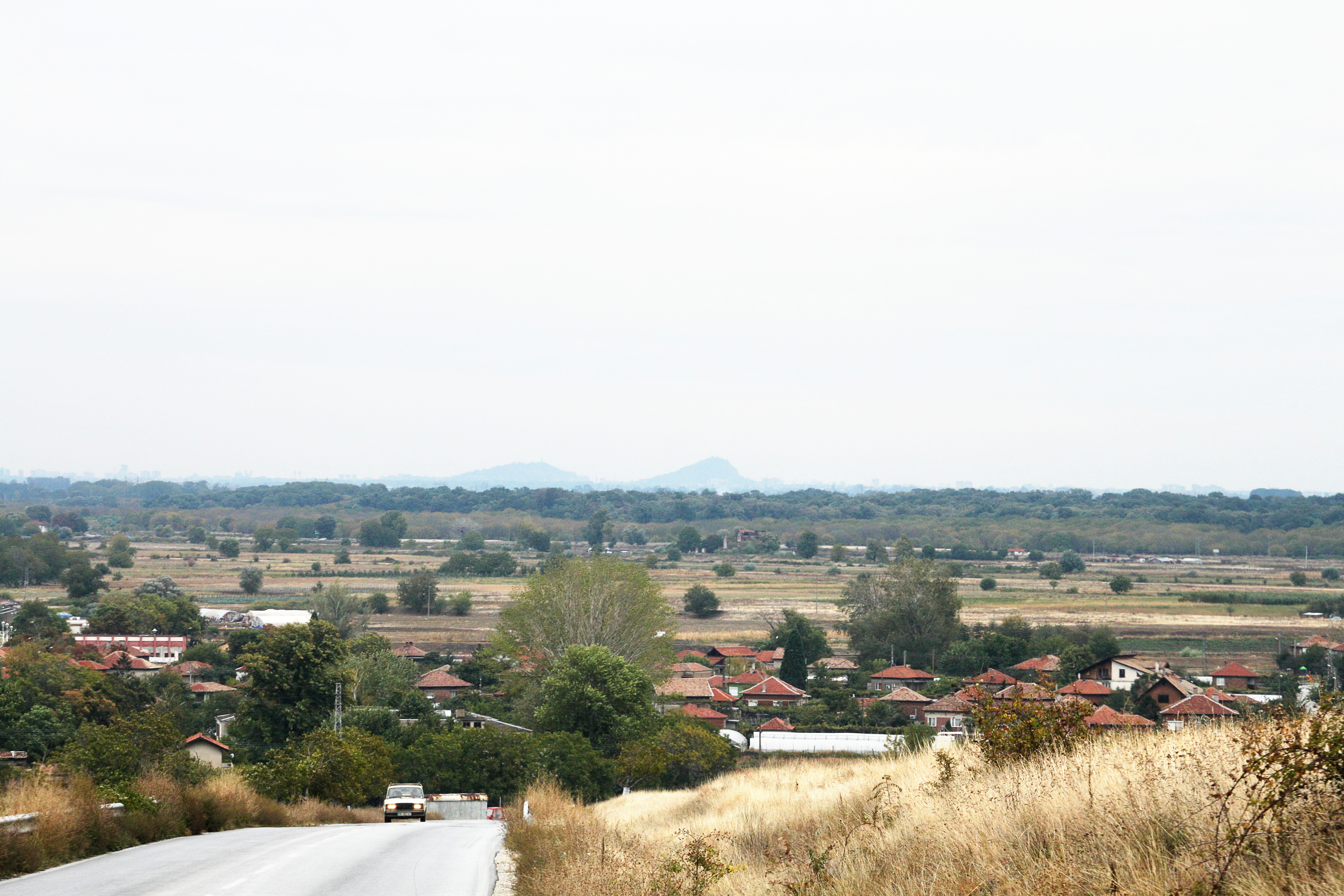 Nowo Selo, Oblast Plowdiw, Bulgarien